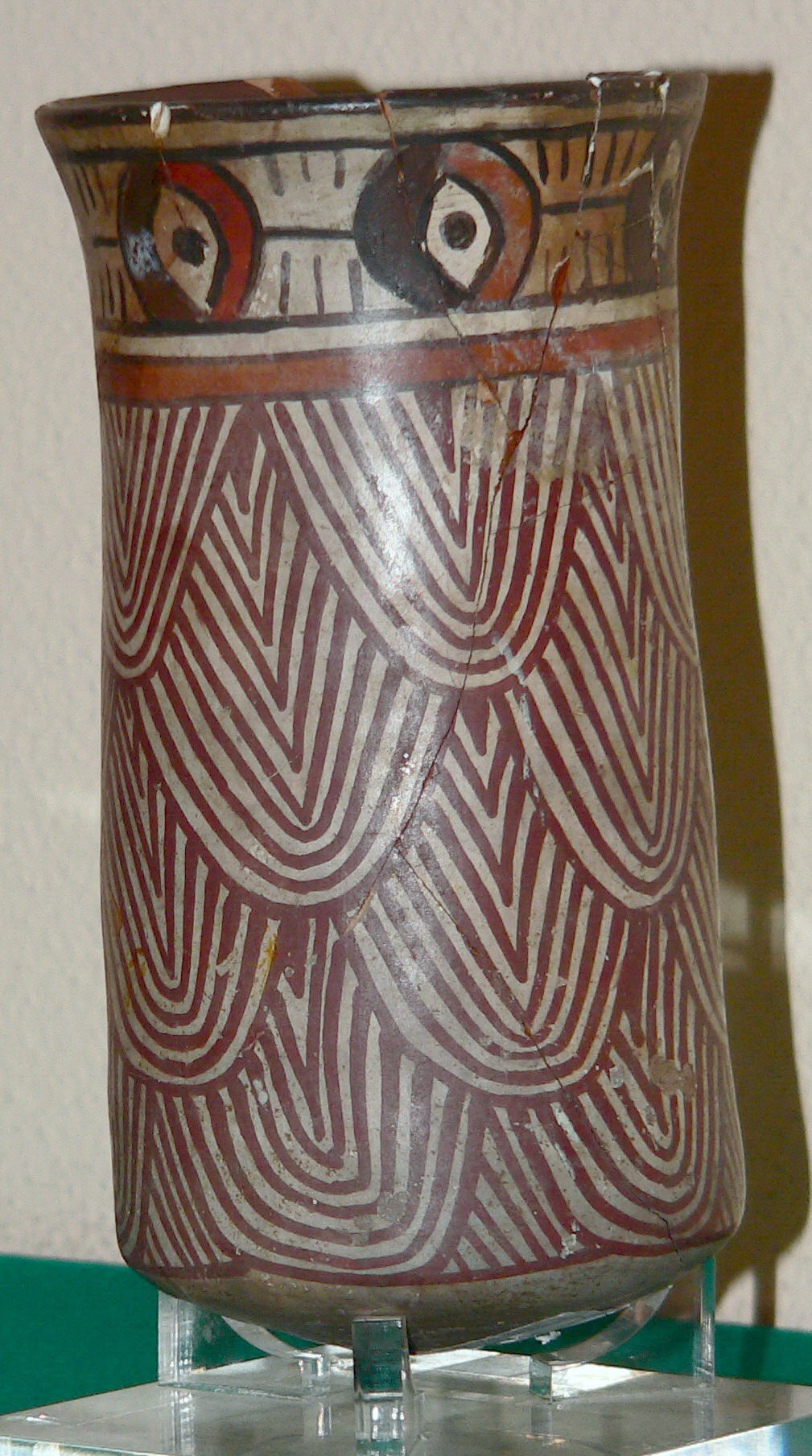 Descripción: Vaso de barro. Antigüedad: Siglo VII a XI d.C Cultura: Cultura Huari País : Perú Fotógrafo: © Manuel González Olaechea y Franco Fecha de la foto : 25 de abril de 2008